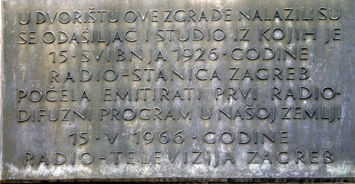 spomen ploča na Gornjem gradu za Radio stanicu Zagreb